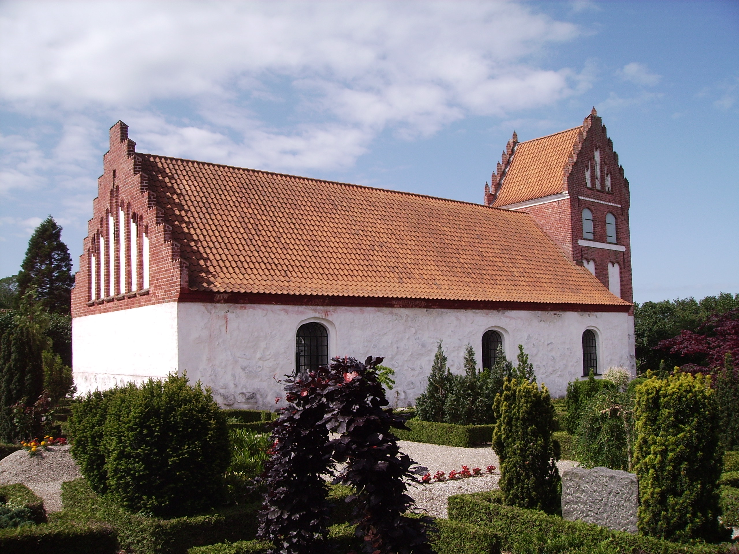 Helnæs Kirke, Helnæs Sogn, Båg Herred, Odense Amt, Danmark - Helnæs Kirke fra nordøst